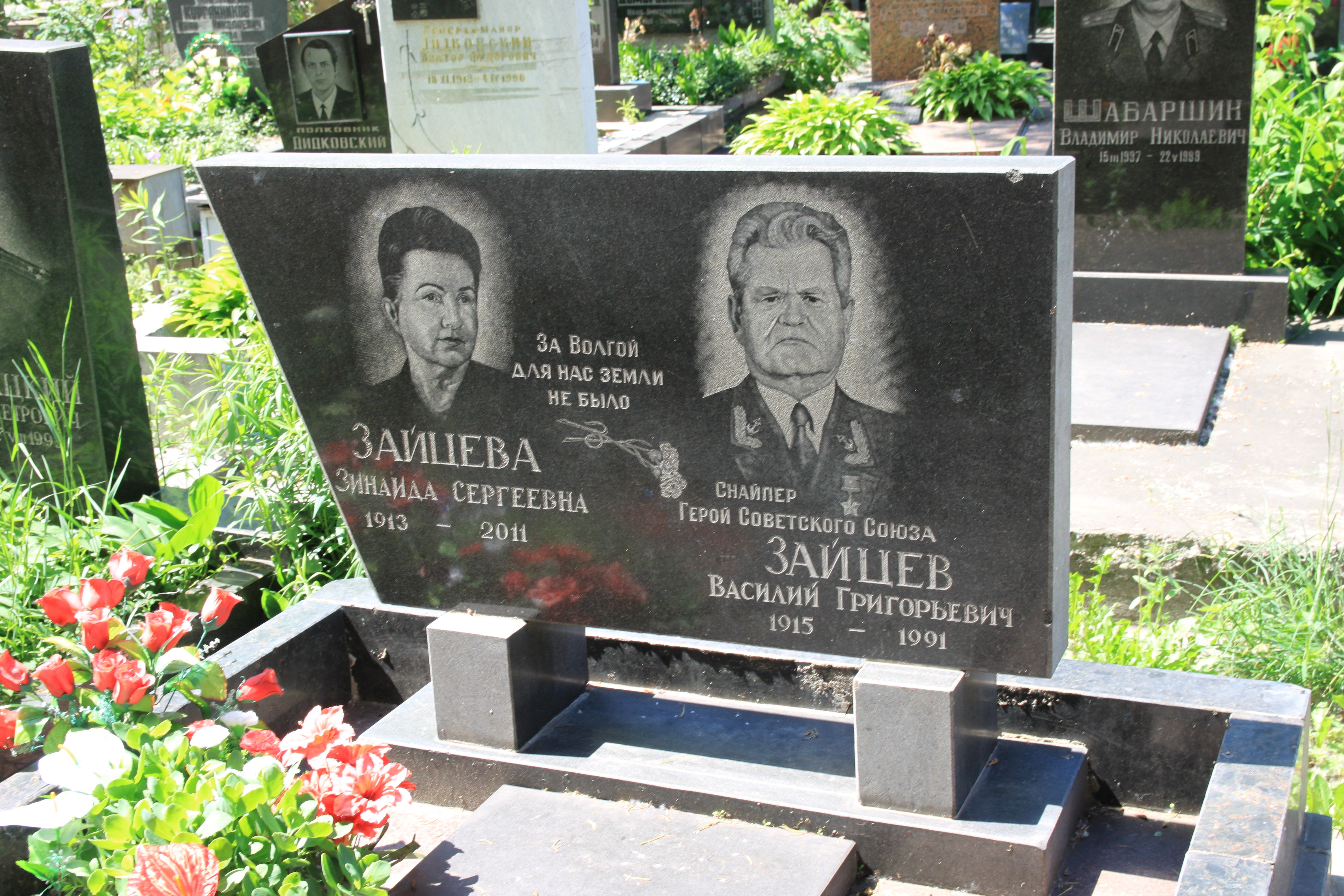 Кенотаф Герою Советского Союза Василию Зайцеву на Лукьяновском военном кладбище Киева.